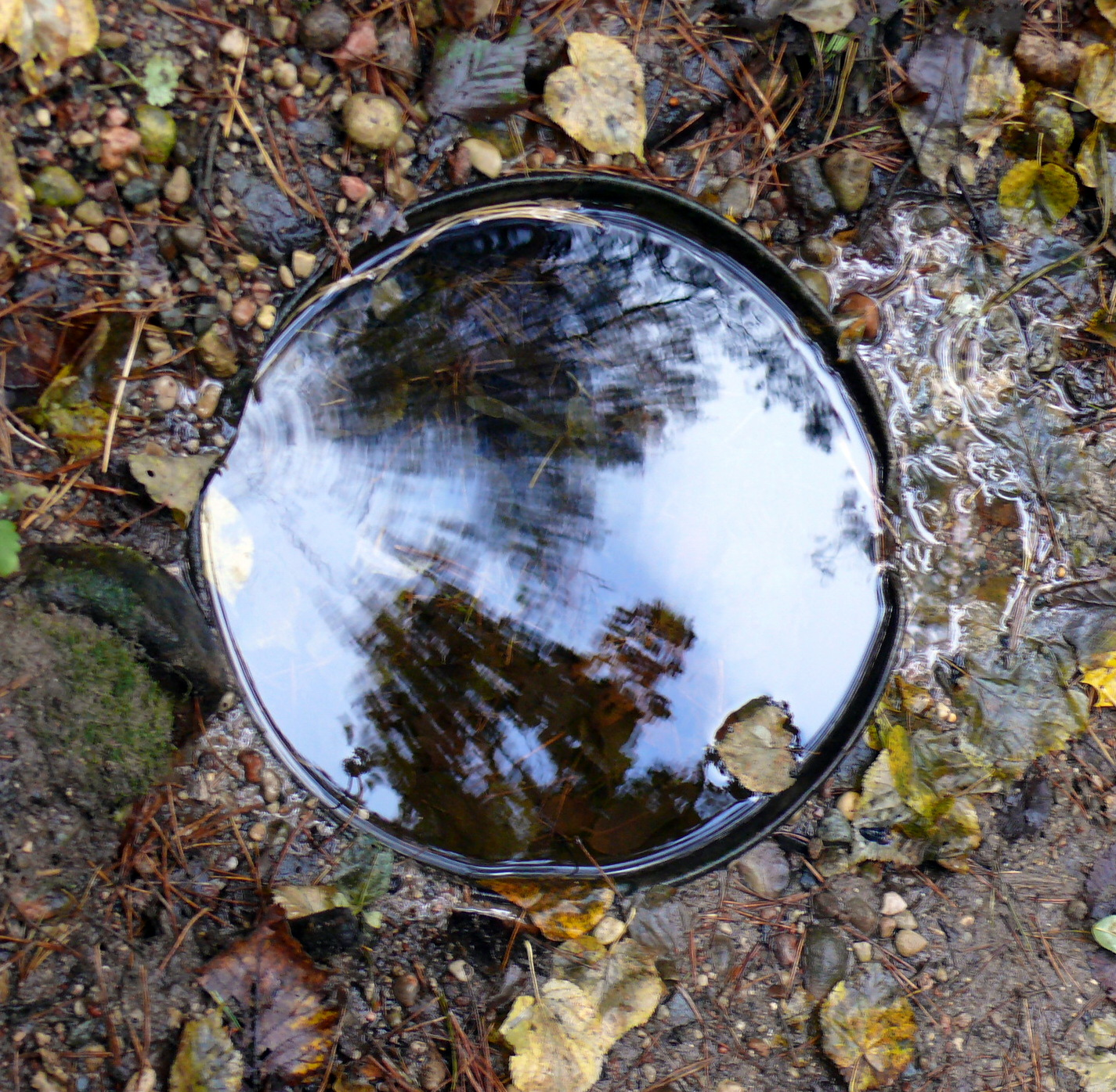 Vingio parko šaltinis